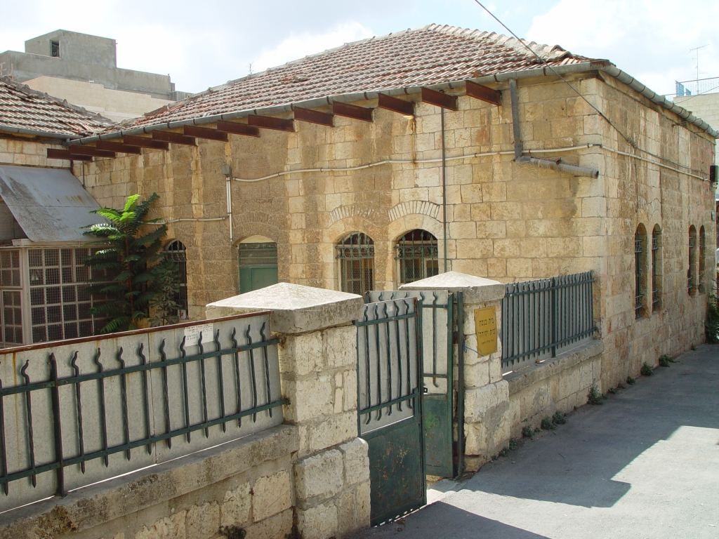 בית הכנסת בית יהודה, שכונת בית יעקב ירושלים